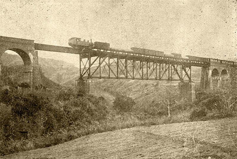 魚藤坪溪鐵橋。